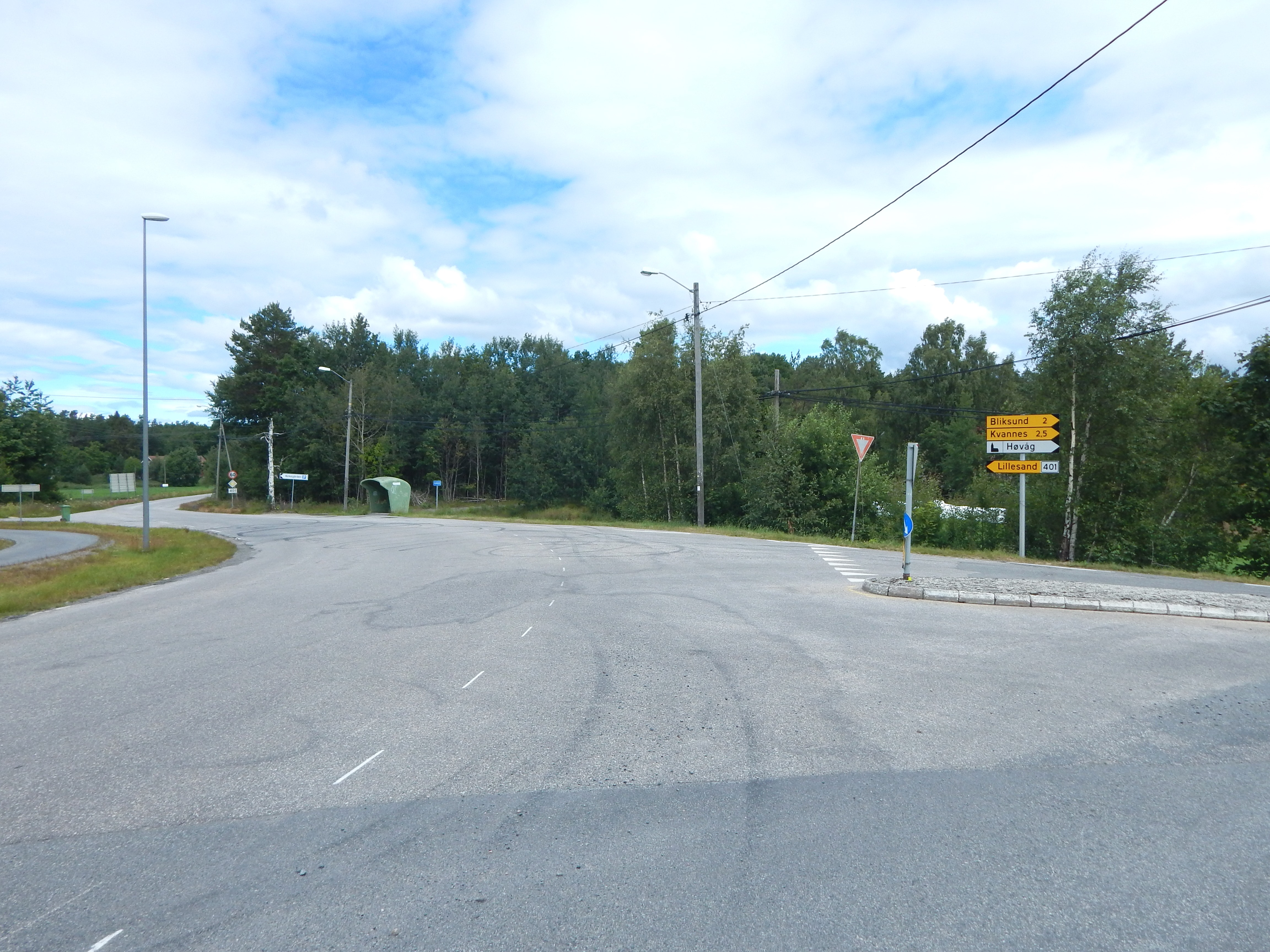 Primær fylkesvei 401 i Høvåg, i krysset med fylkesvei 226